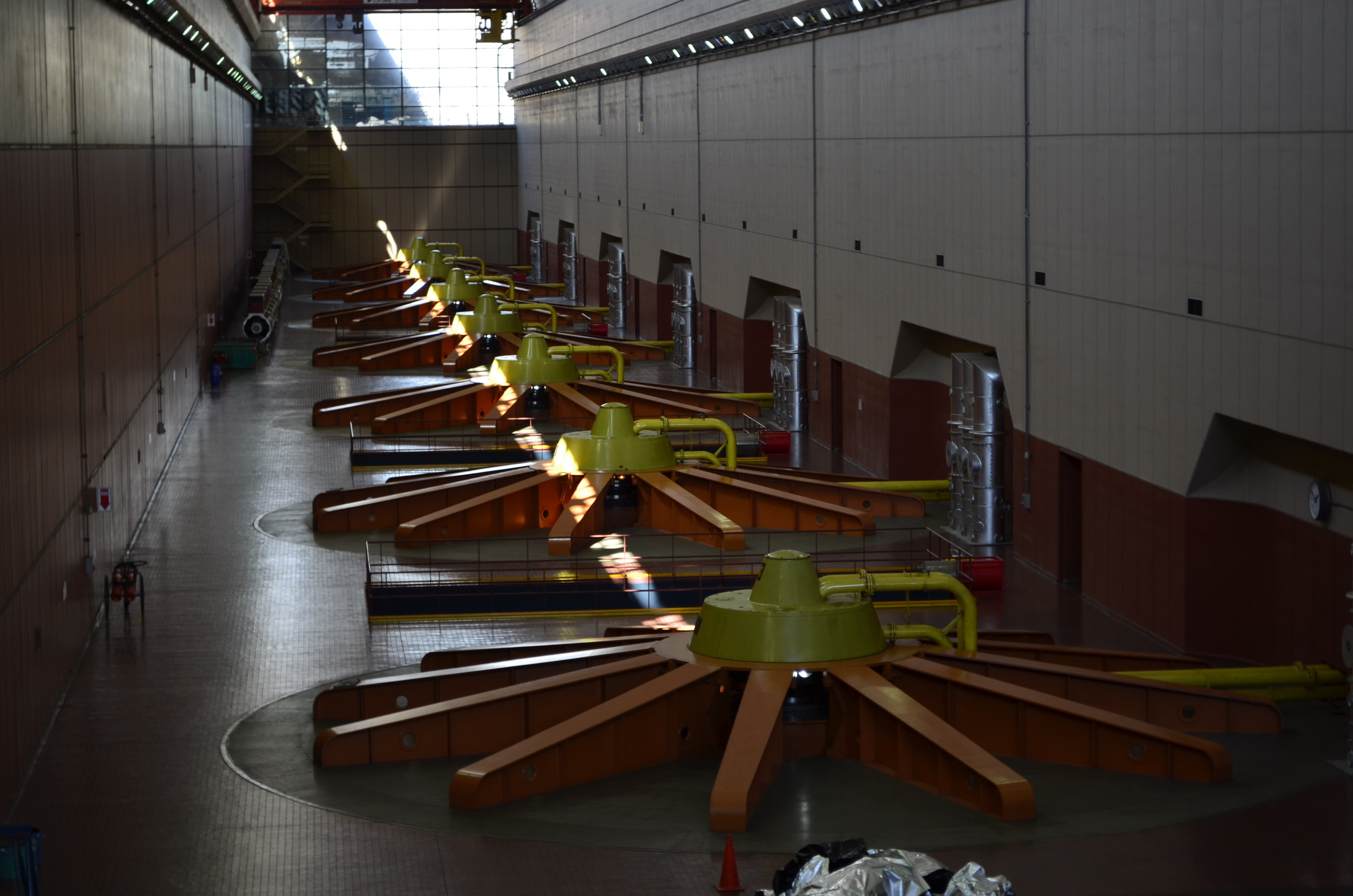 Turbinas